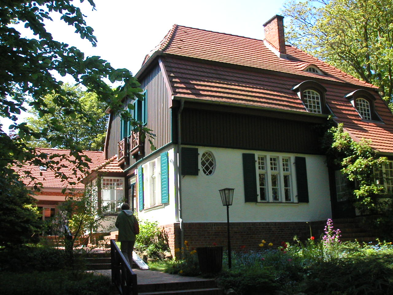 Haus Seedorn auf Hiddensee, Wohnhaus von Gerhart Hauptmann (1862-1946).